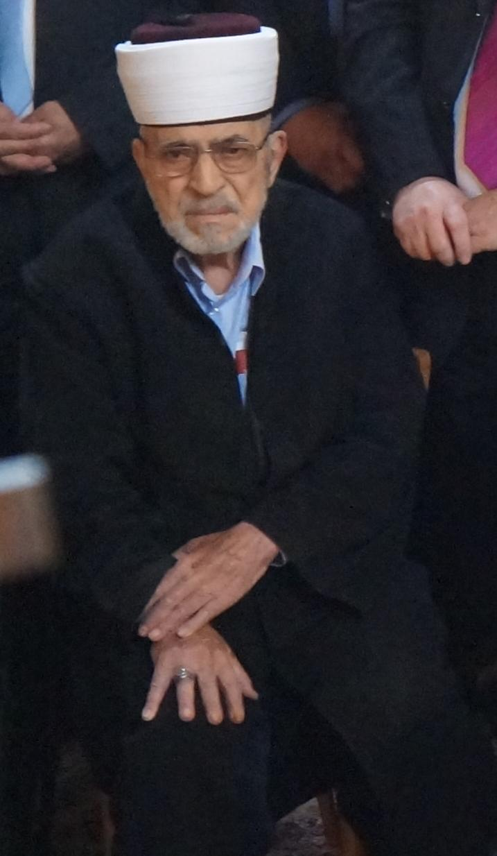 Μέτσο Τζεμαλή